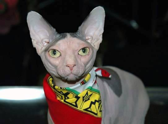 Канадский сфинкс IW SGC Classicalcats Valentino